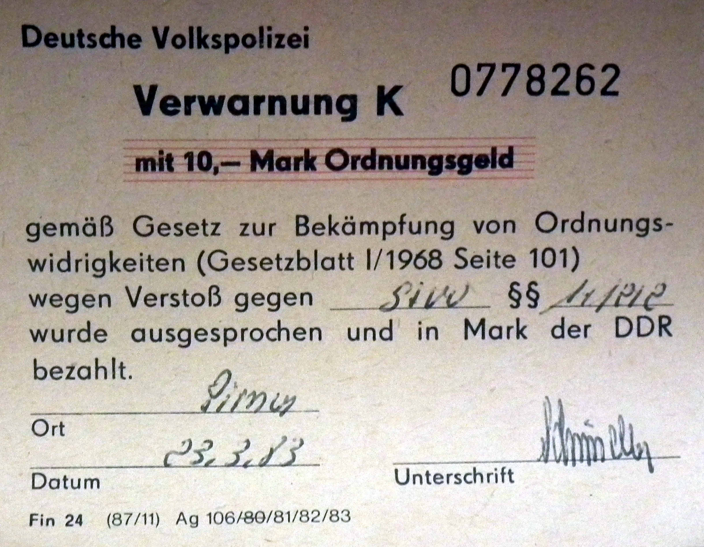 Deutsche Volkspolizei Verwarnung K, DDR-Museum Pirna, Veröffentlicht mit Genehmigung der Museumsleitung